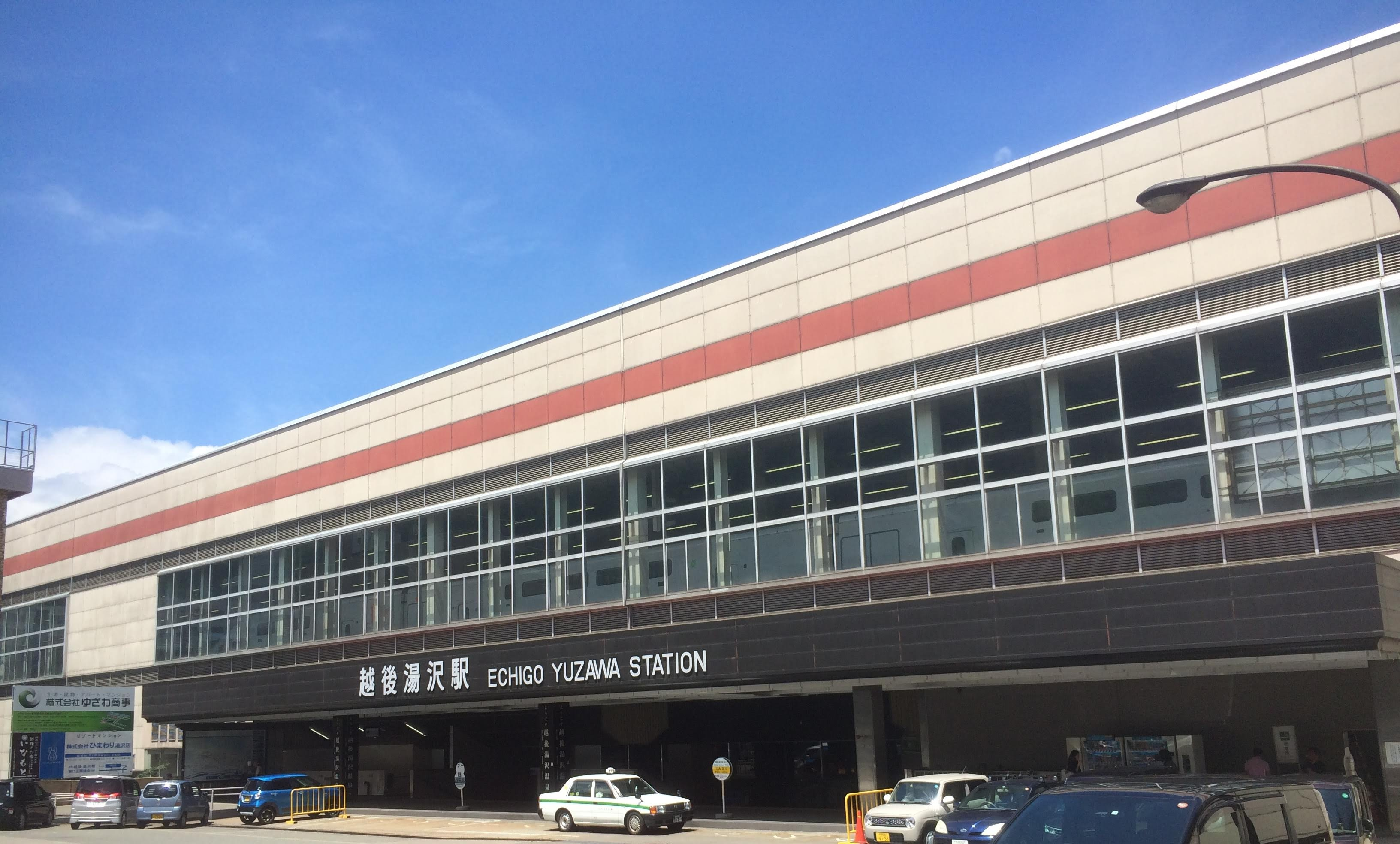 越後湯沢駅